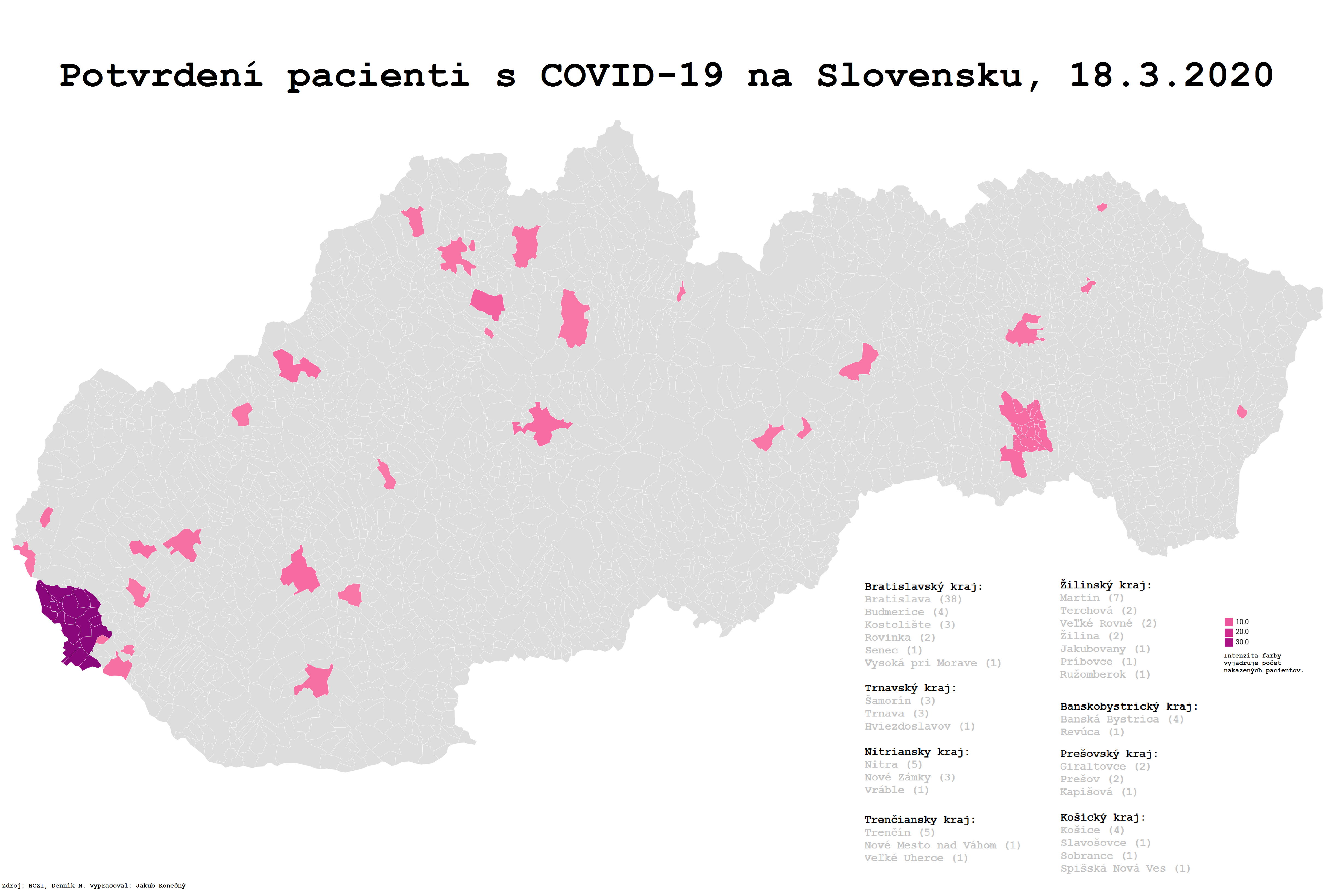 Obce, v ktorých boli potvrdené prípady nákazy koronavírusom COVID-19 na Slovensku do 18.3.2020.